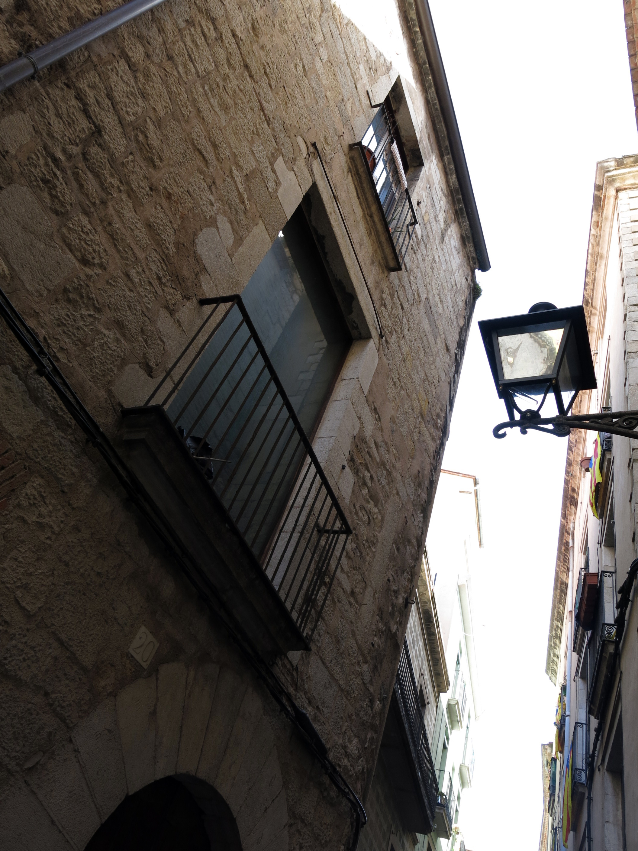 Casa al carrer de la Força, 20 (Girona)